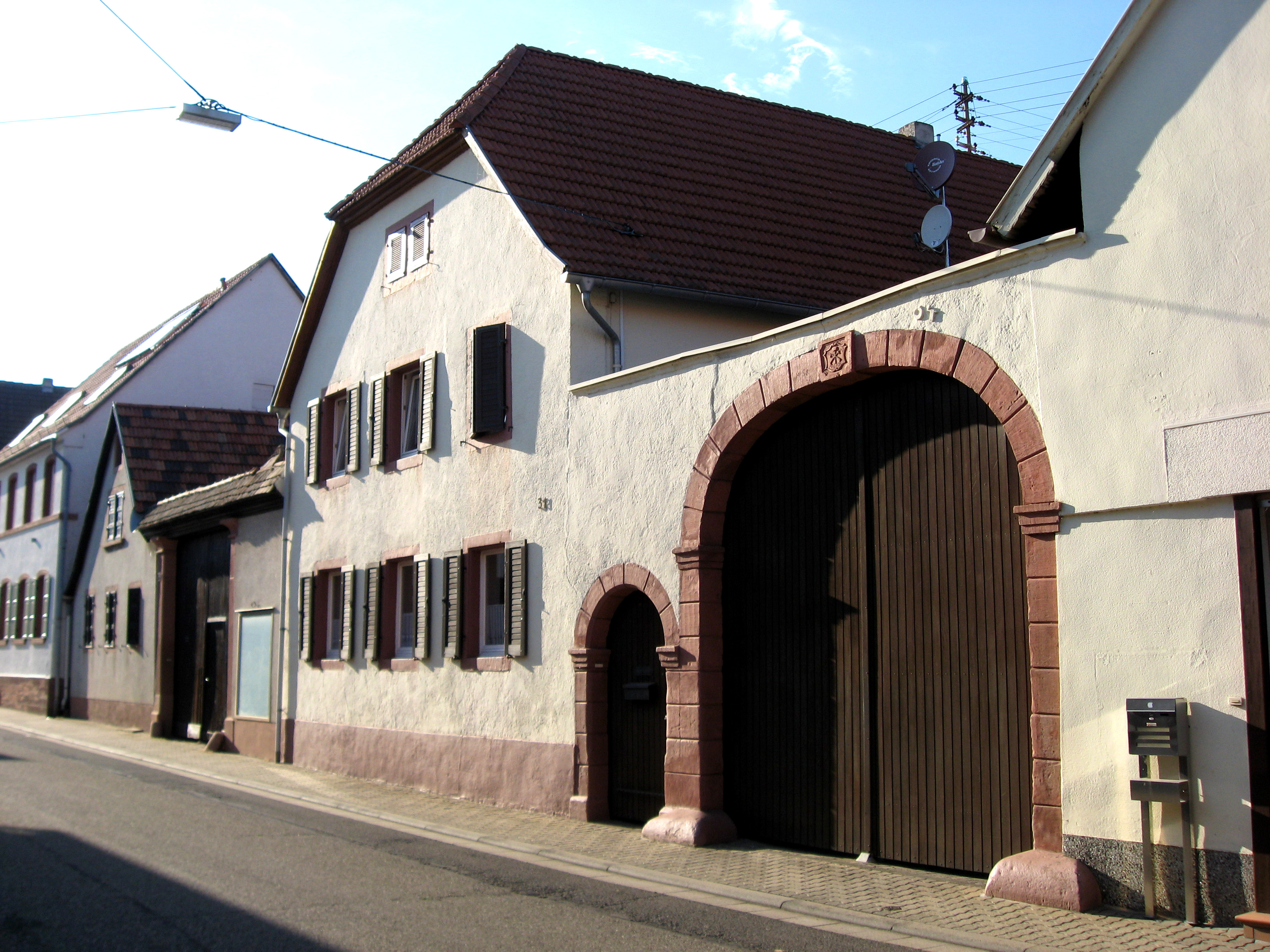 barocke Hofanlage Hauptstraße 31 in Freimersheim; Torbogen mit Küferzeichen